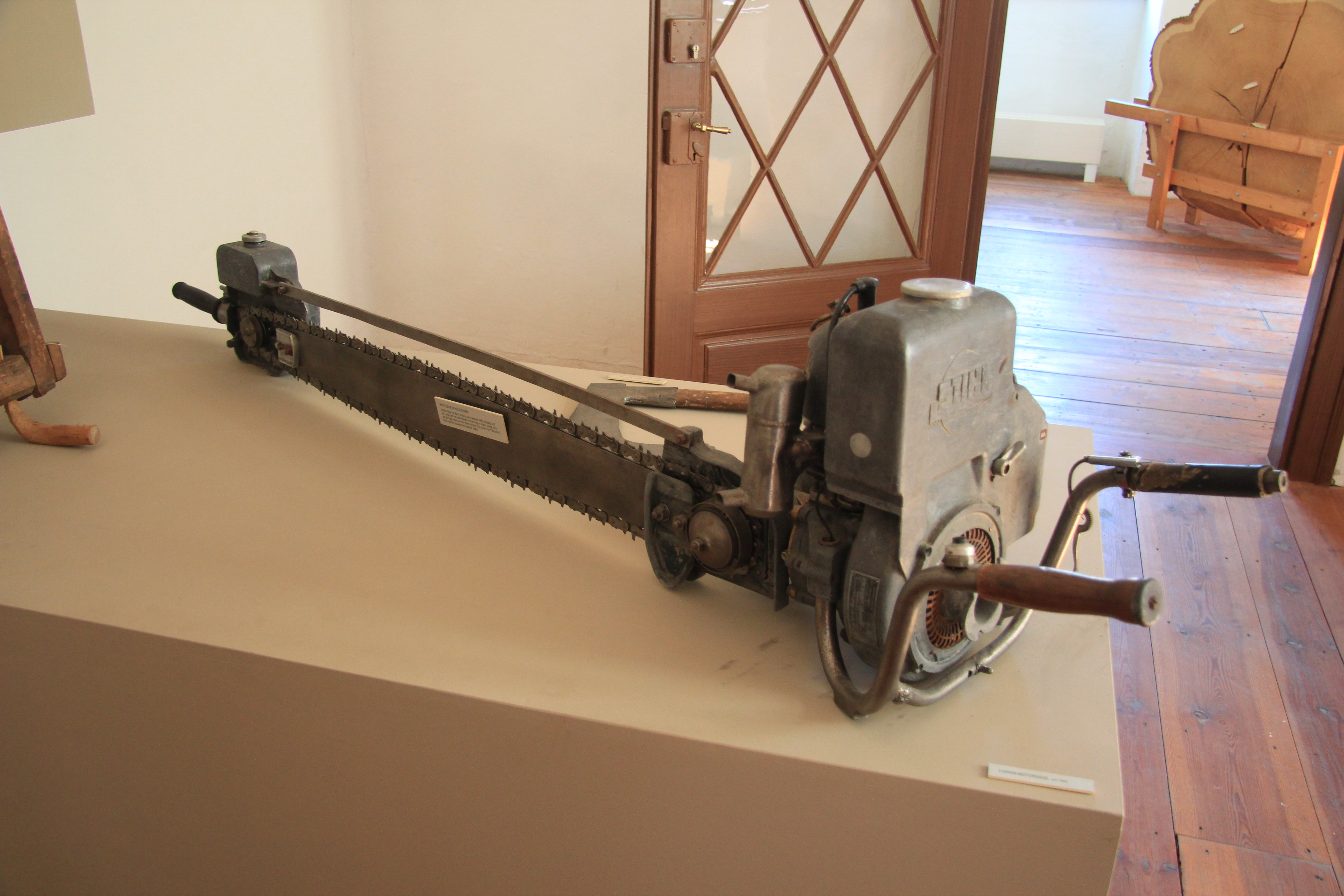 Kartause Mauerbach